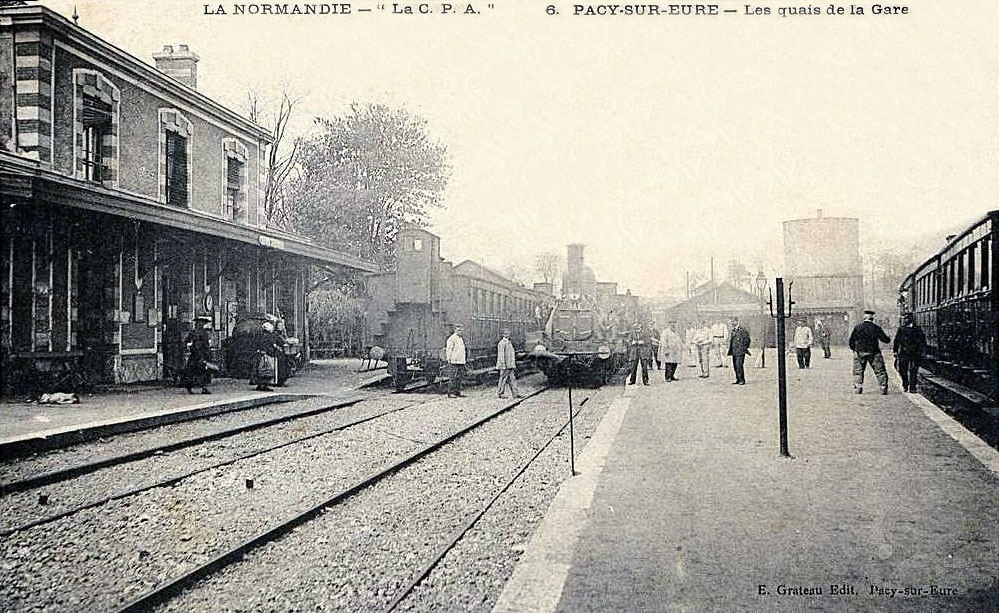 Pacy-sur-Eure - Les quais de la gare.